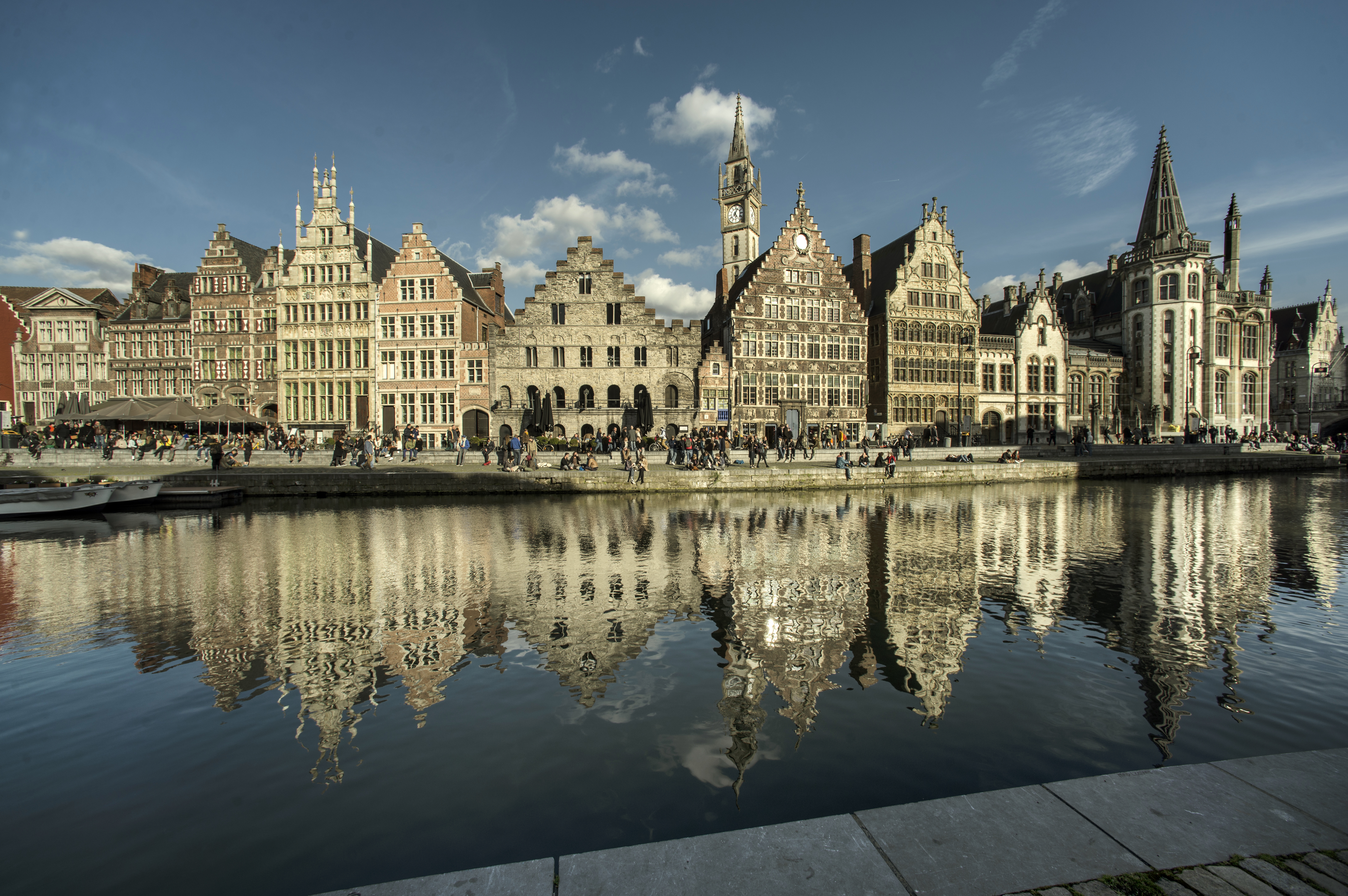 De Gentse Graslei gezien vanop de Koornlei.